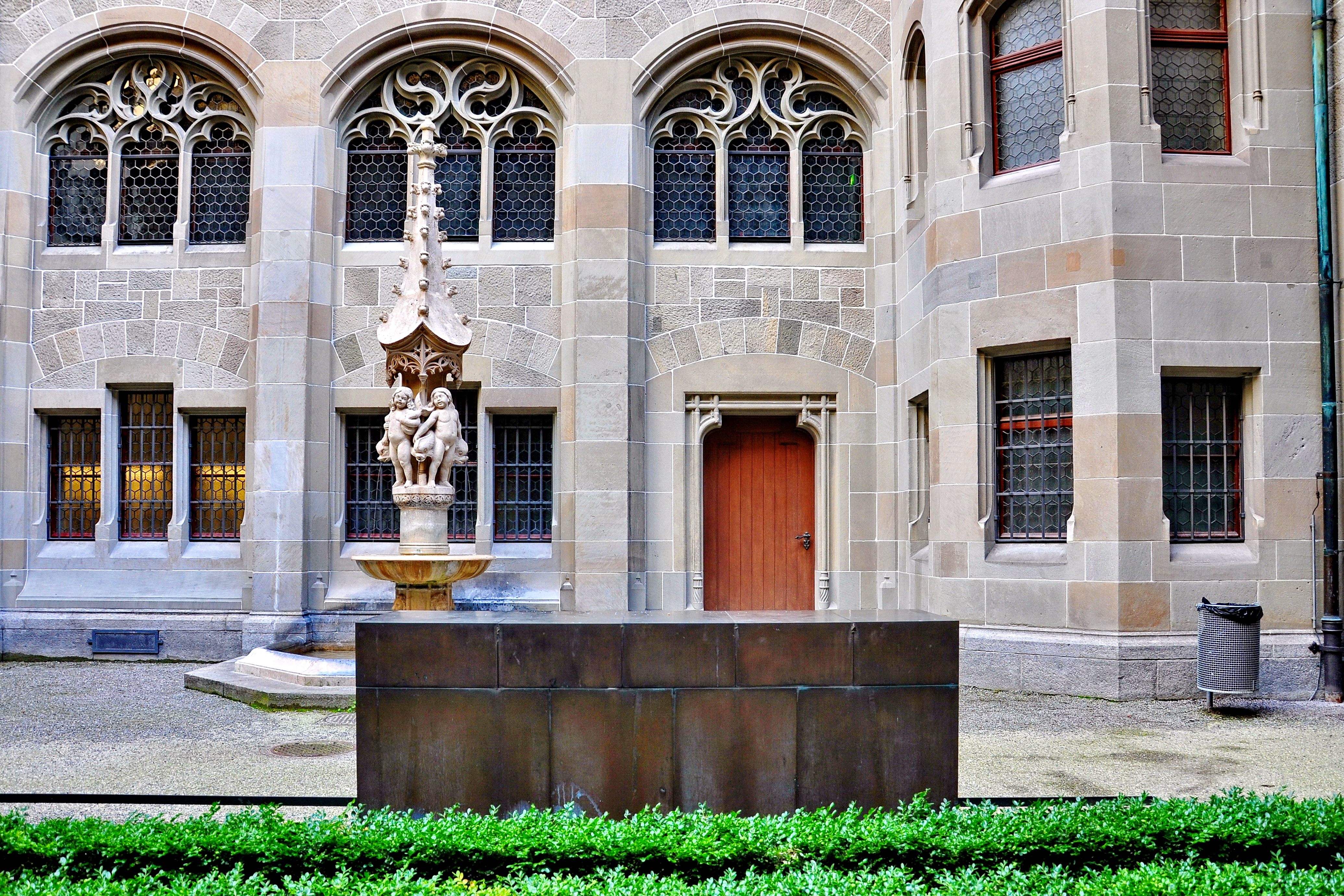 Katharina von Zimmern (1478-1547) memorial in the Fraumünster Kreuzgang in Zürich (Switzerland) "Die Stadt vor Unruhe und Umgemach bewahren und tun, was Zürich lieb und dienlich ist". 1524. Katharina von Zimmern, Zürichs letzte Äbtissin, zur Übergabe der Abtei Fraumünster an die Stadt.